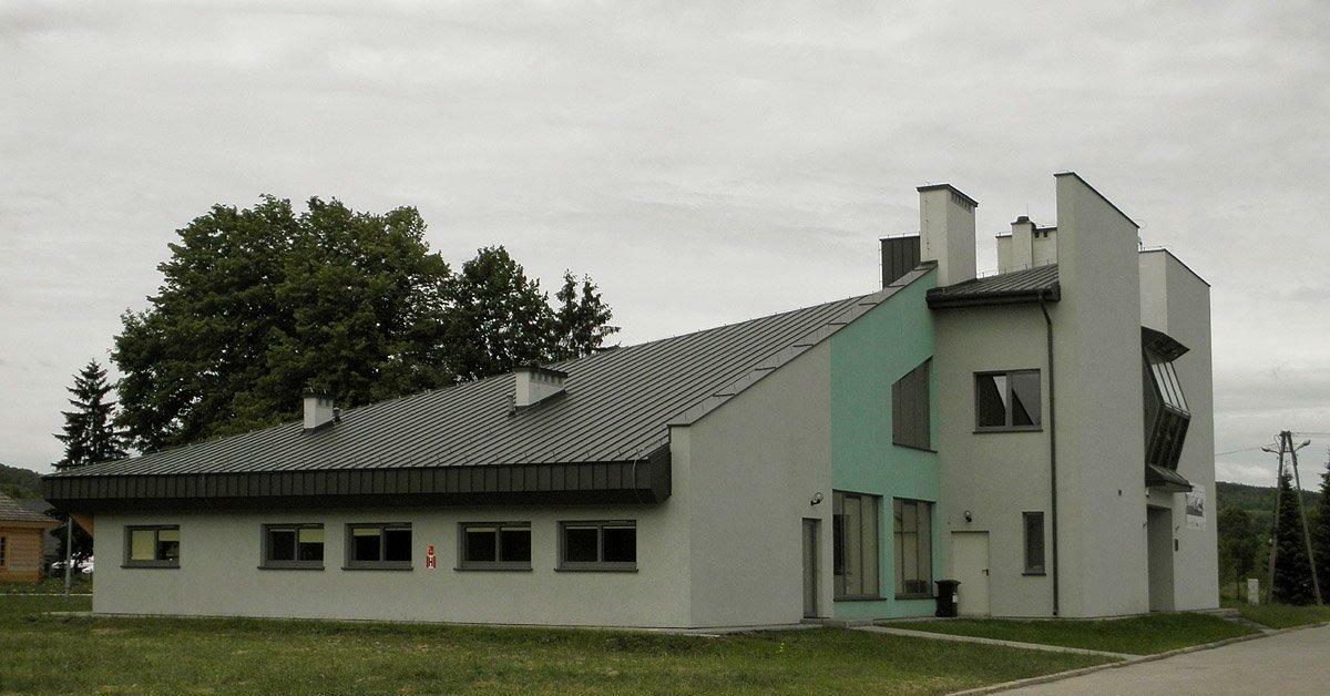 "Szklany Dom", szkła w nim niewiele.